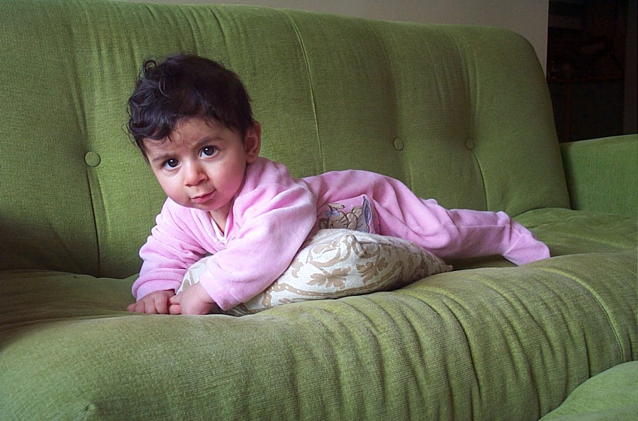 6mo Baby